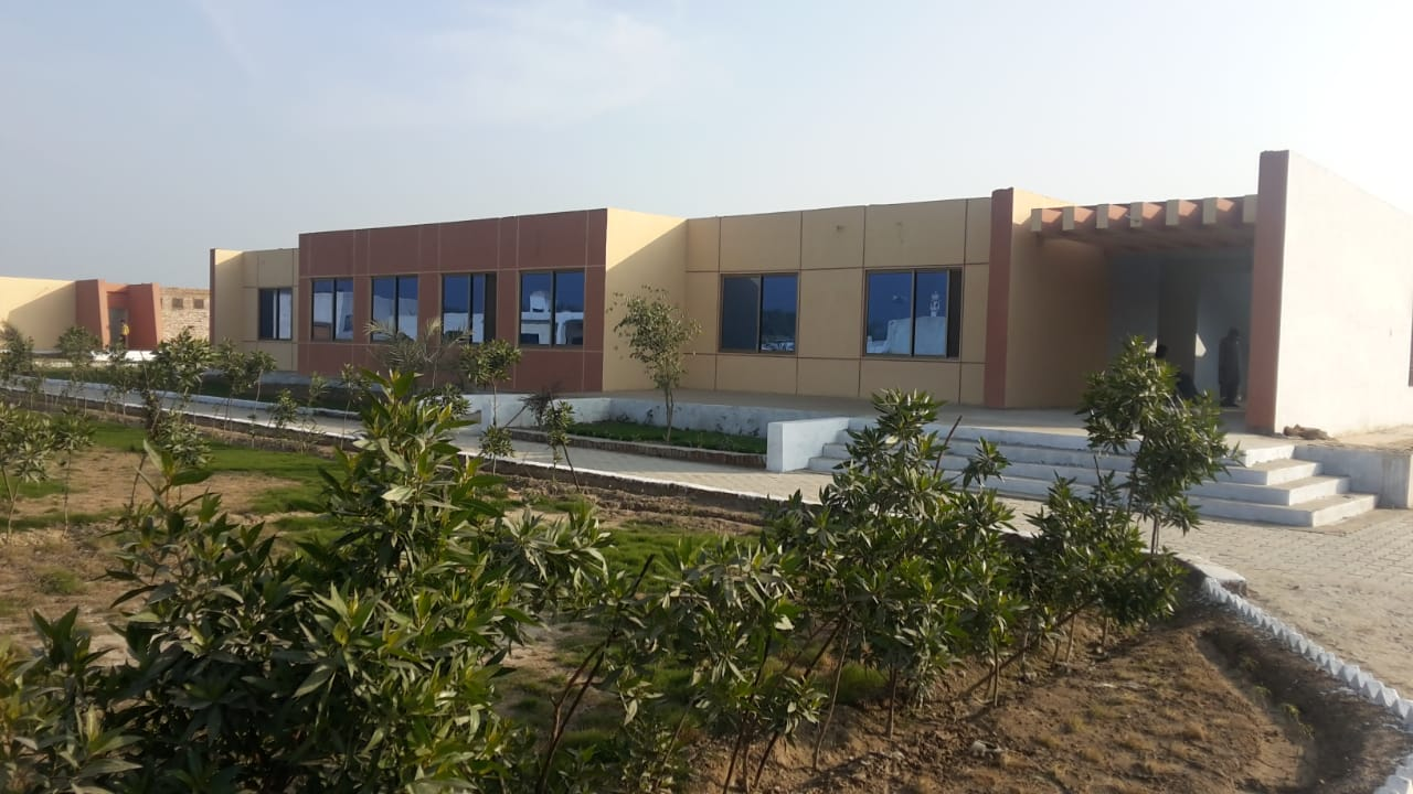 LEEDS College, Bunga Hayat